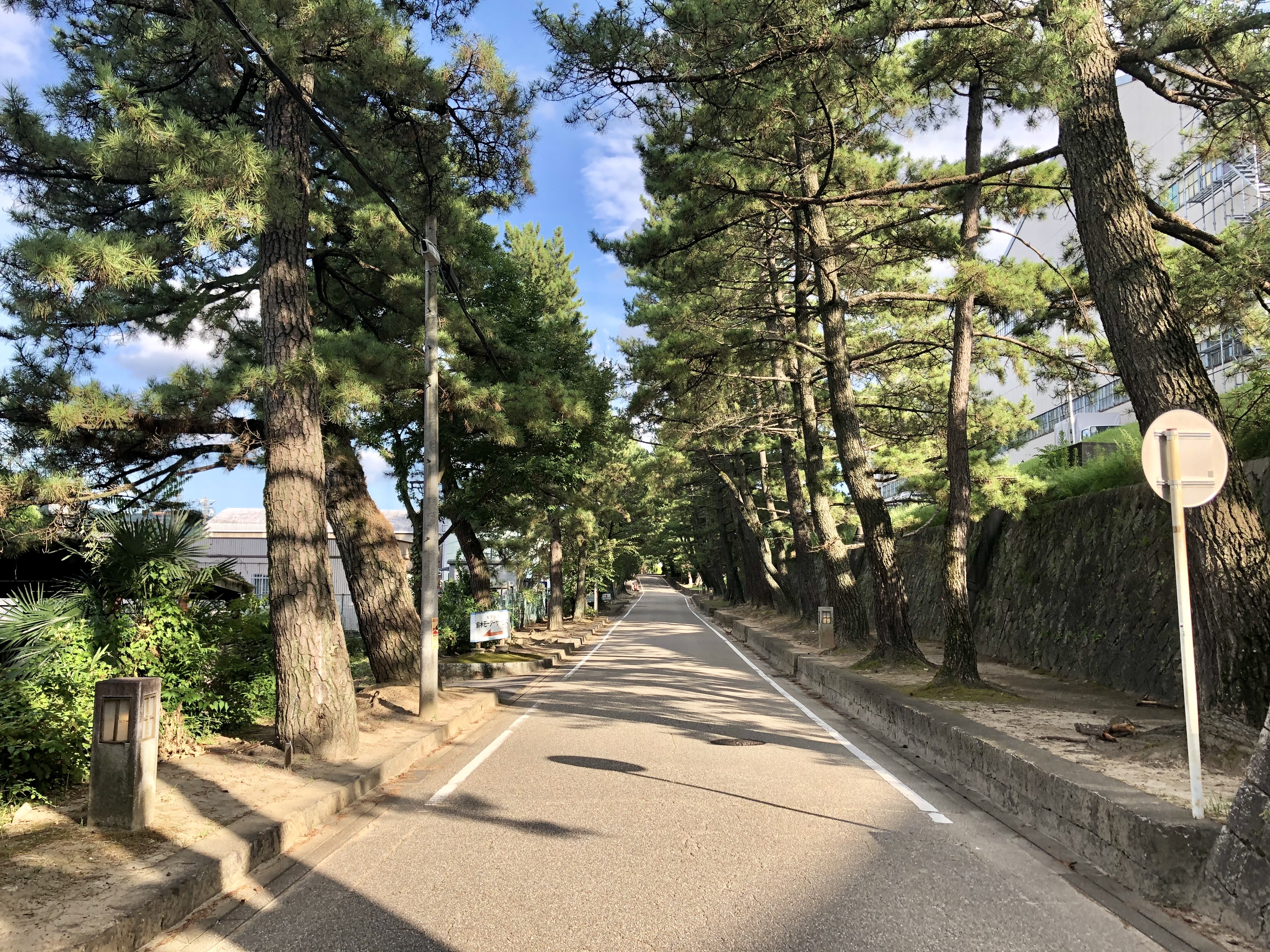 愛知県指定文化財（天然記念物）に指定された「藤川の松並木」。岡崎市藤川町。